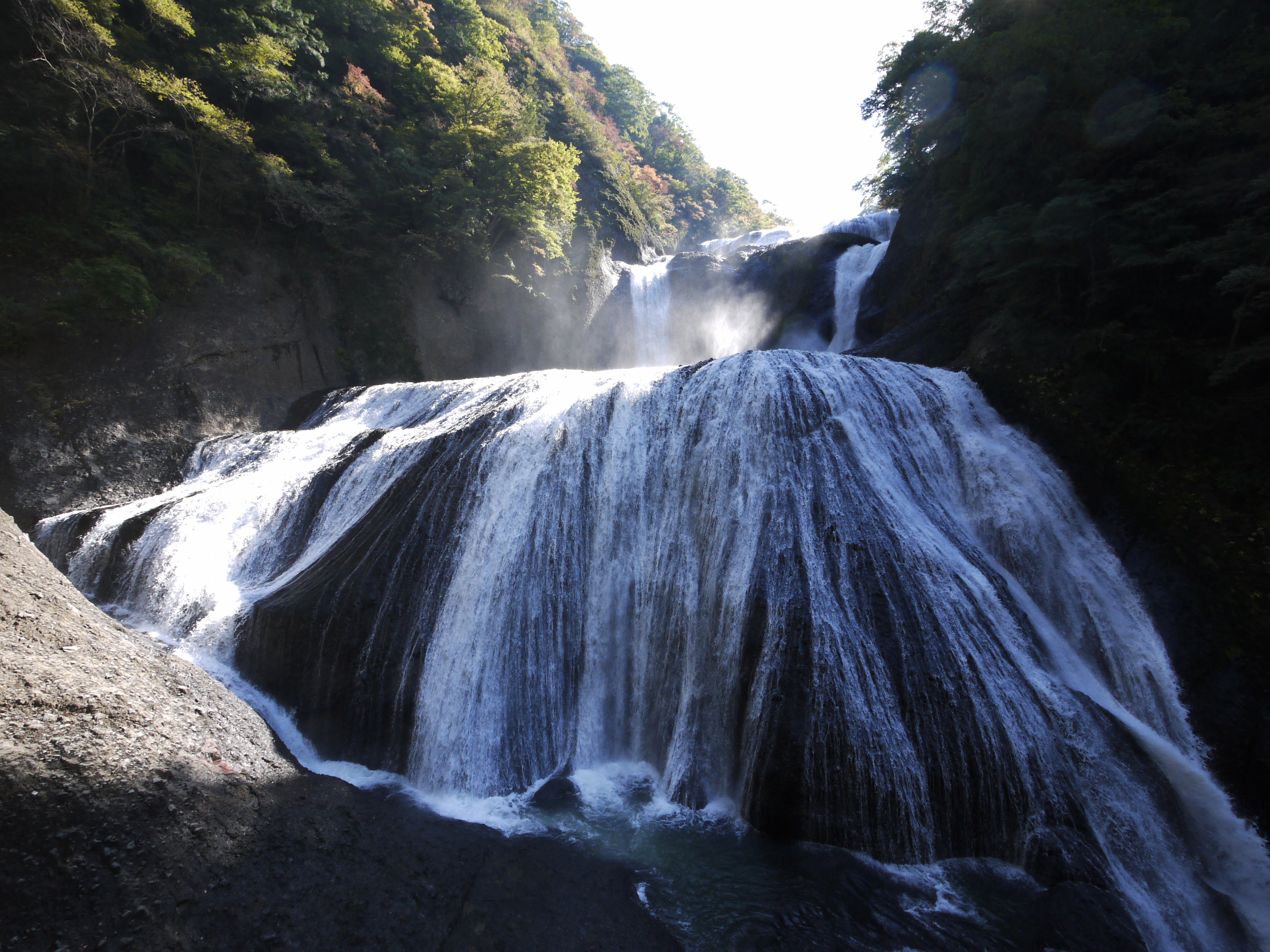 秋の袋田の滝